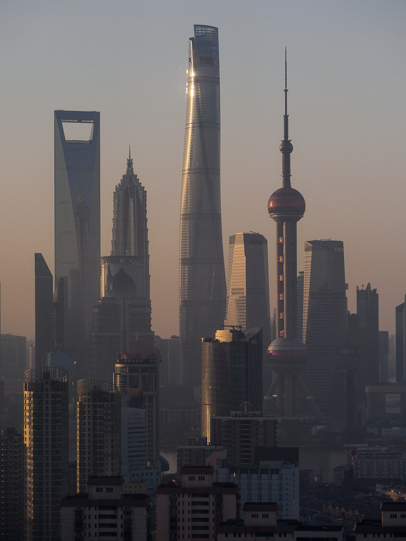 Shanghai